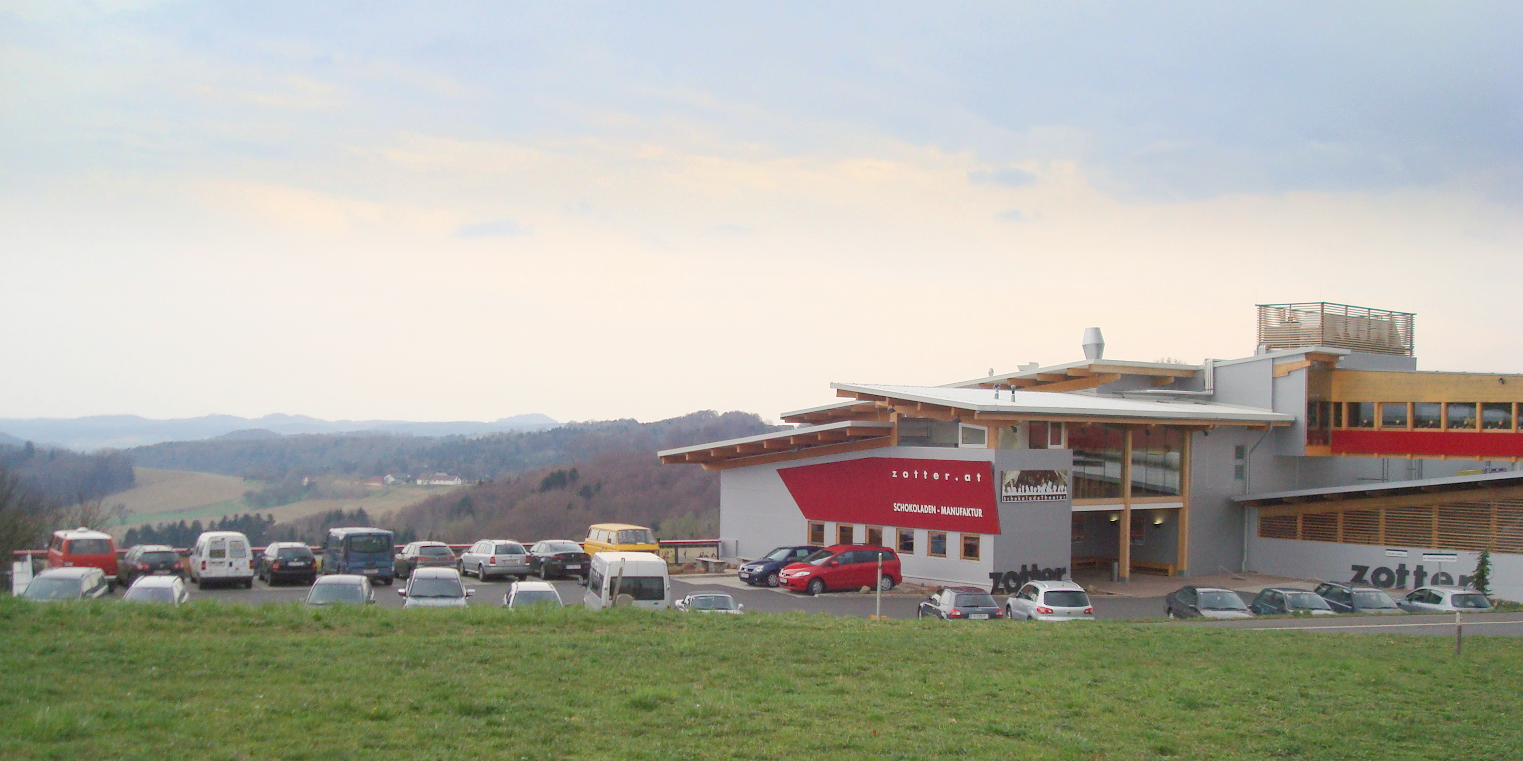 Schokoladenmanufaktur Zotter, Bergl, Riegersburg, Steiermark, Austria